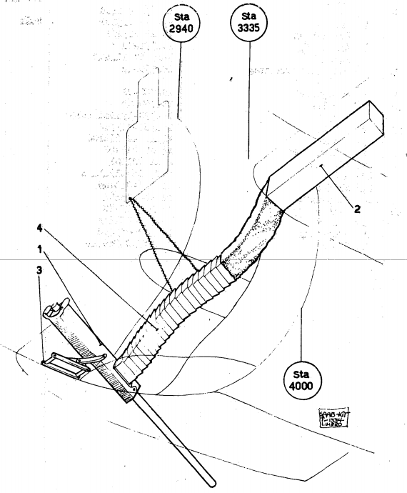 Signalist akan till Saab B 18A och tidiga B 18B.